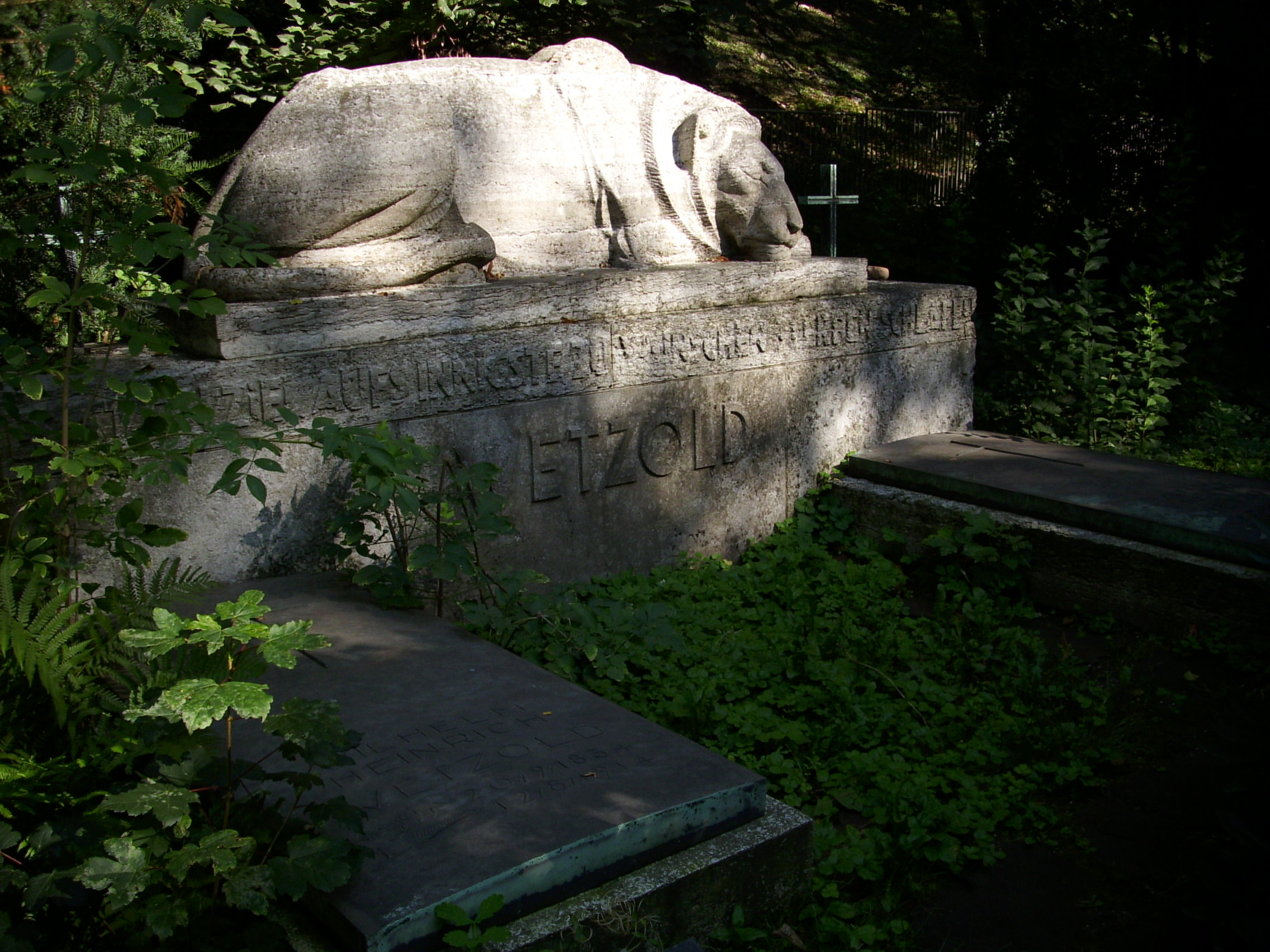 Alfred Thiele: Grabmal Wetzold, 1929, fränkischer Muschelkalk, Südfriedhof Leipzig